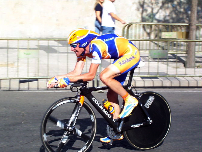 Menchov à l'étape 8 de la Vuelta 2007